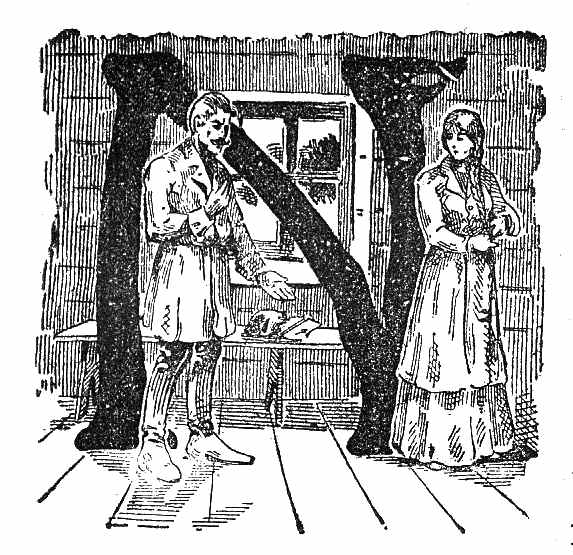 Inicjał z książki Henryka Sienkiewicza "Na polu chwały" (wyd. ok. 1906)